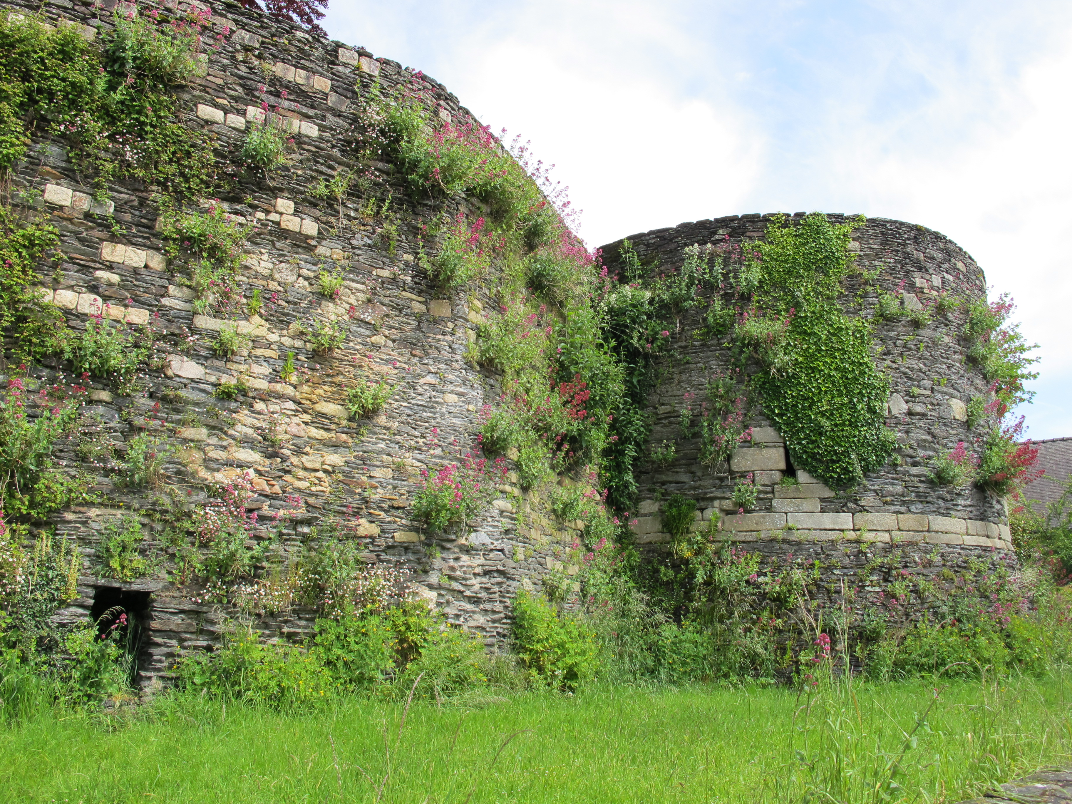 Château de Rochefort-en-Terre